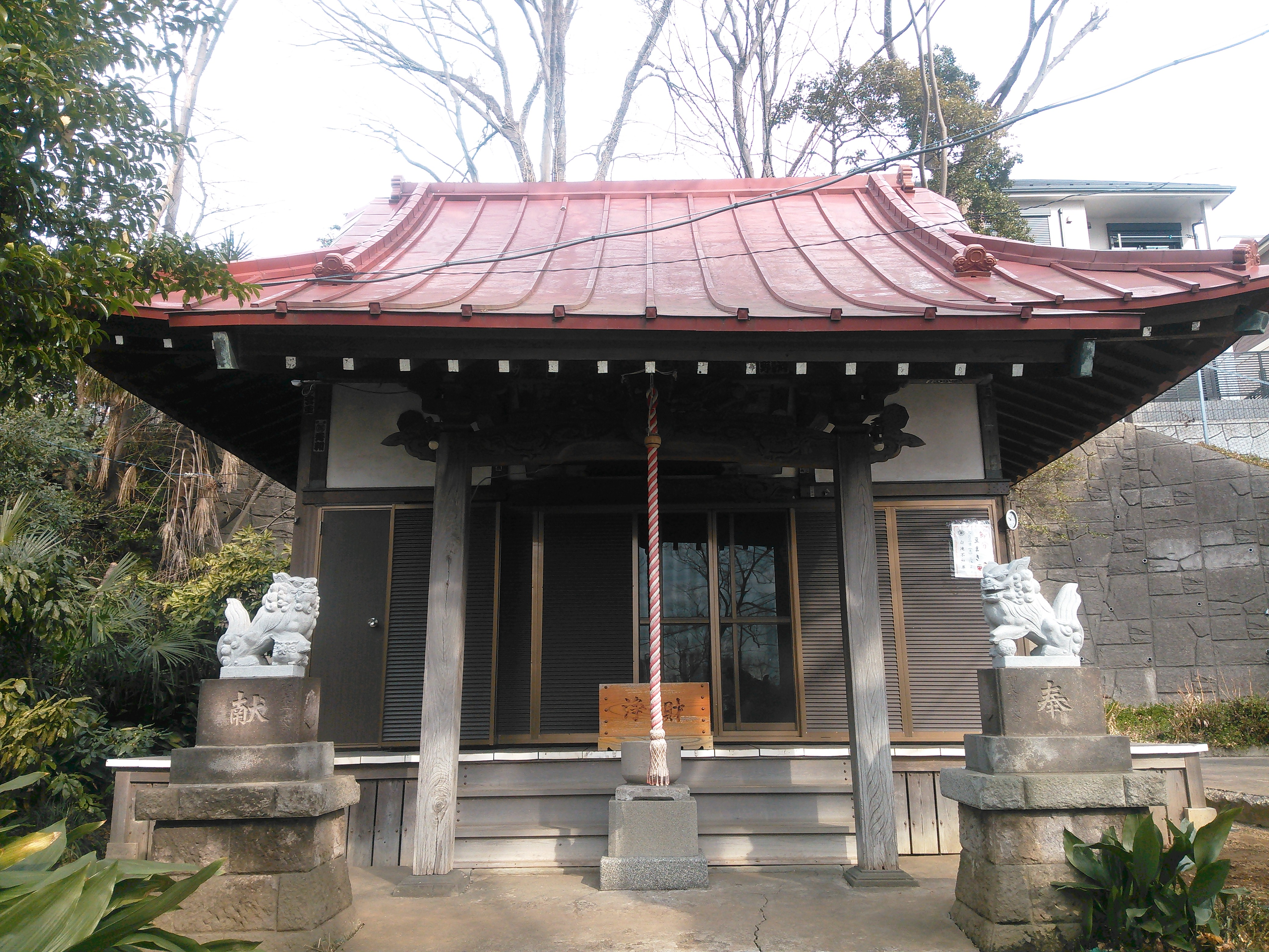 横浜市中区、白滝不動尊の本堂